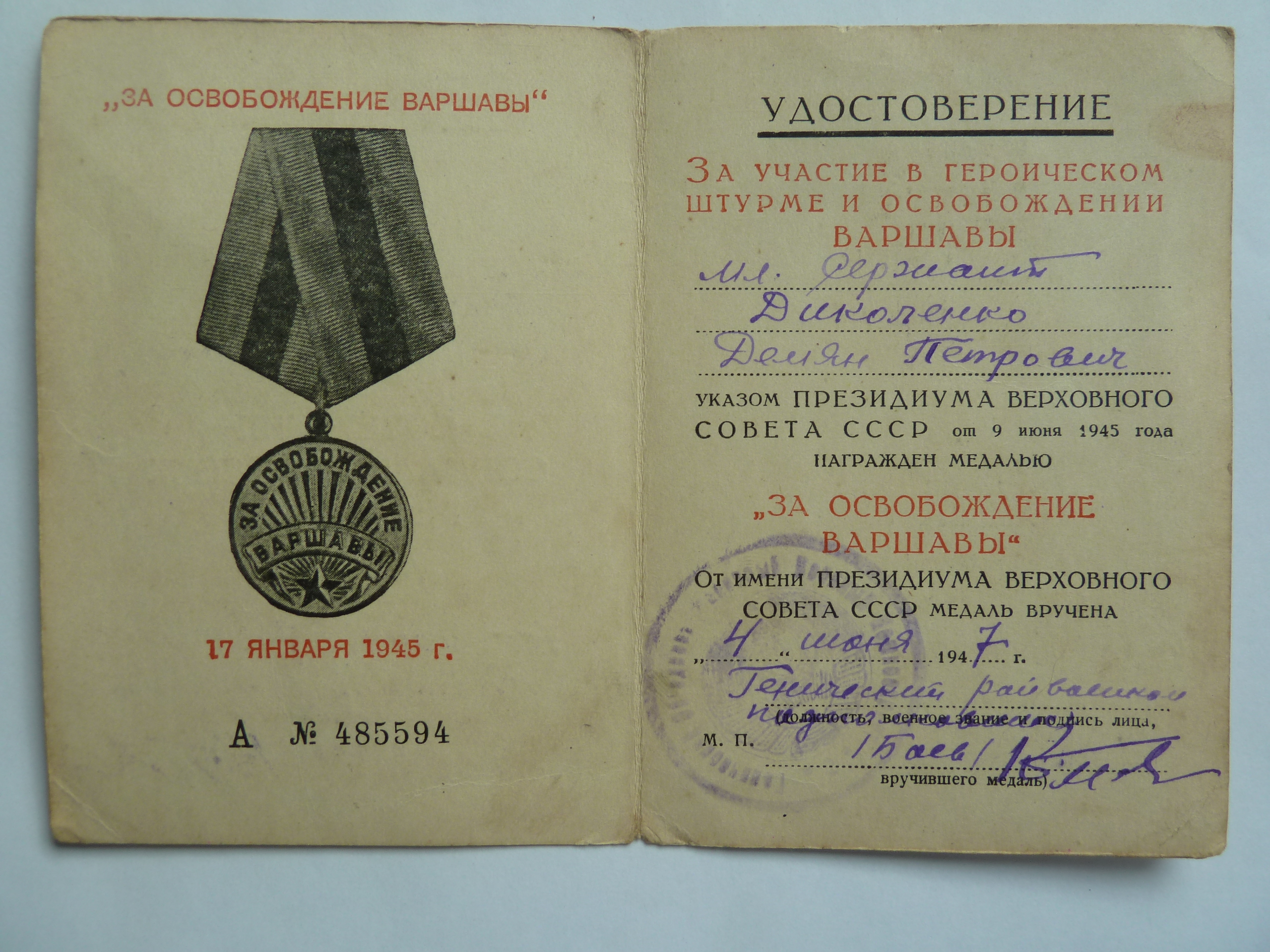 Dekret k Medaili Za osvobození Varšavy, udělen 1947